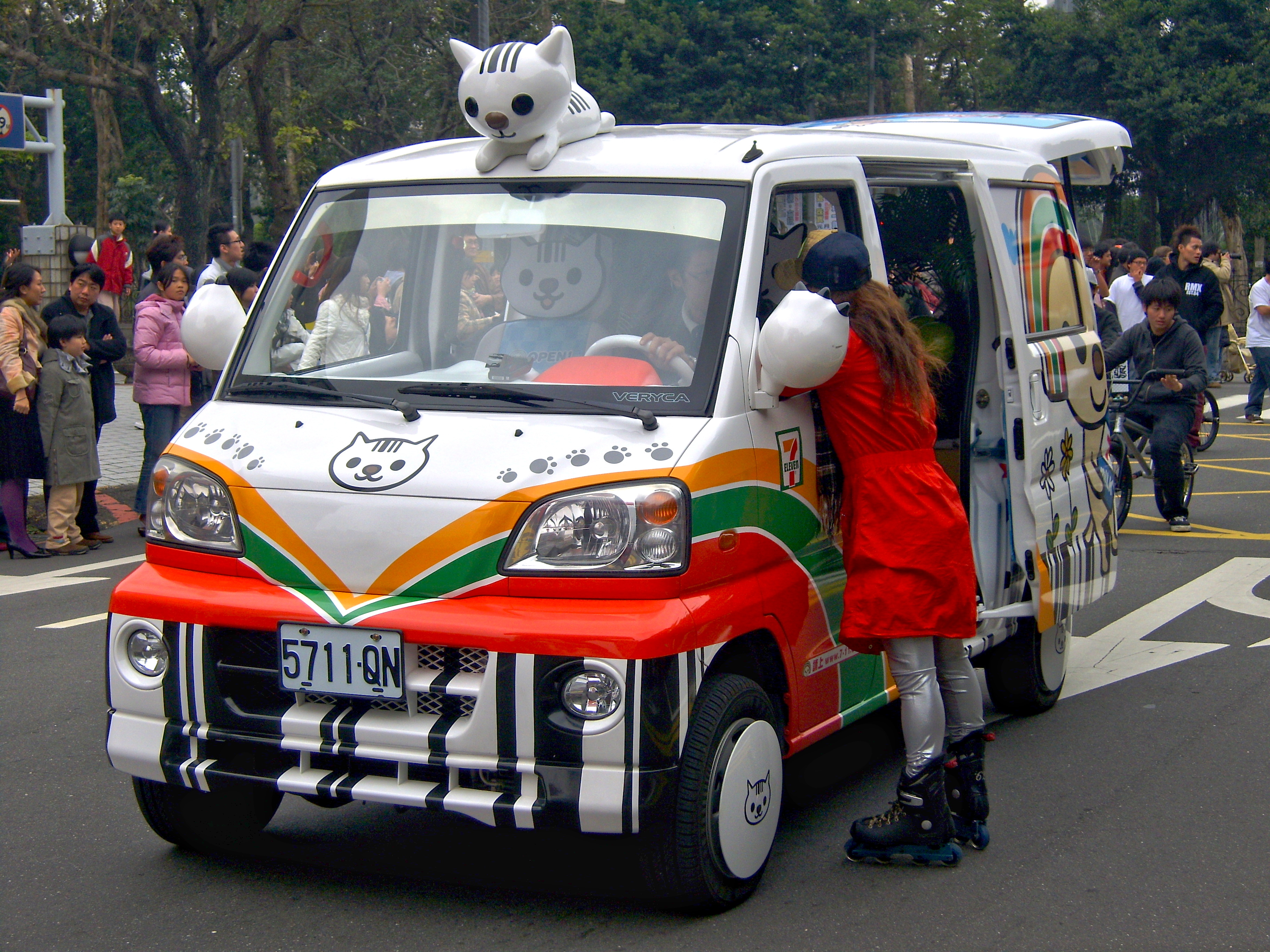 統一超商中華菱利OPEN小將家族條碼貓彩繪車5711-QN。